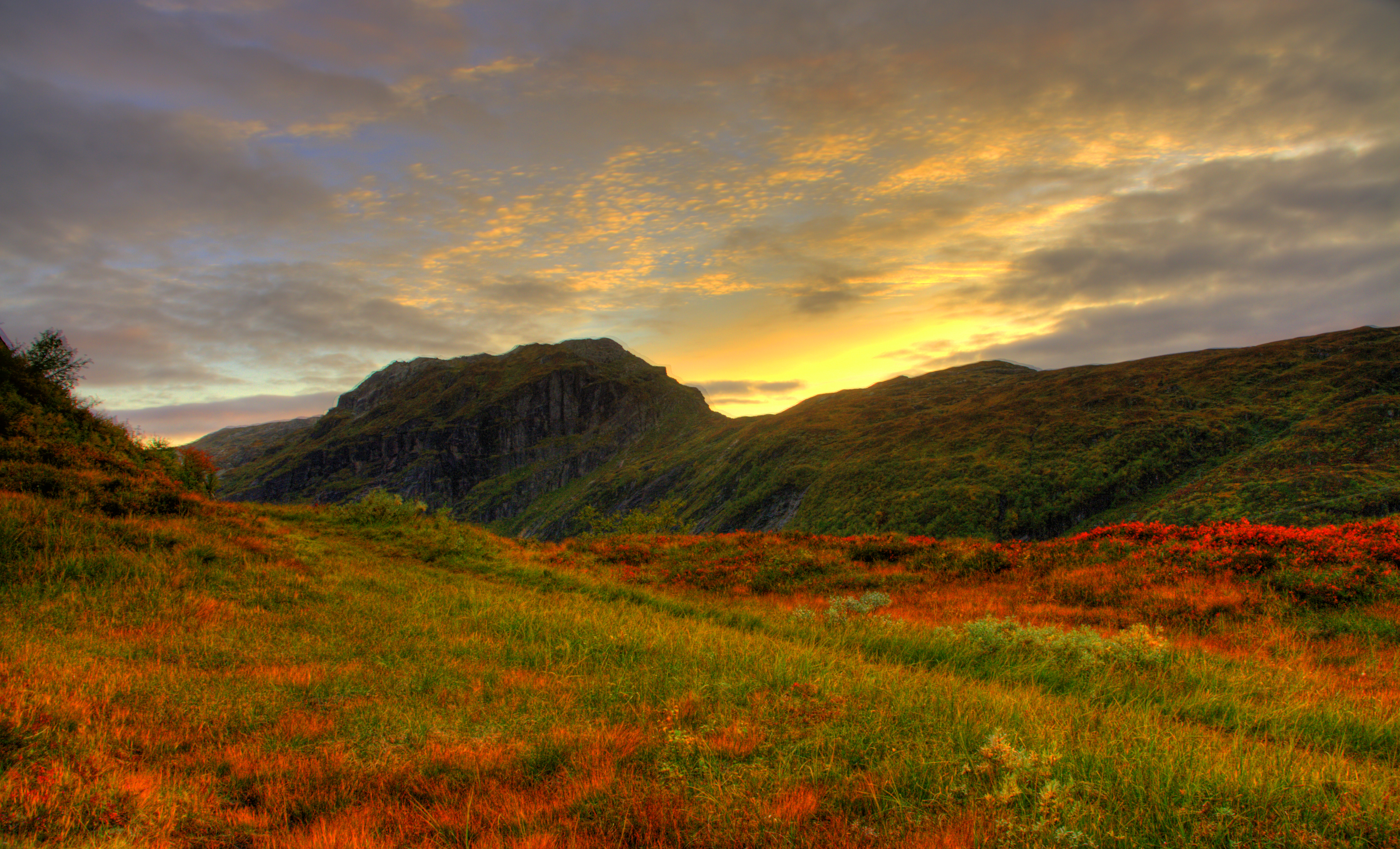 Klungerdalsnipa